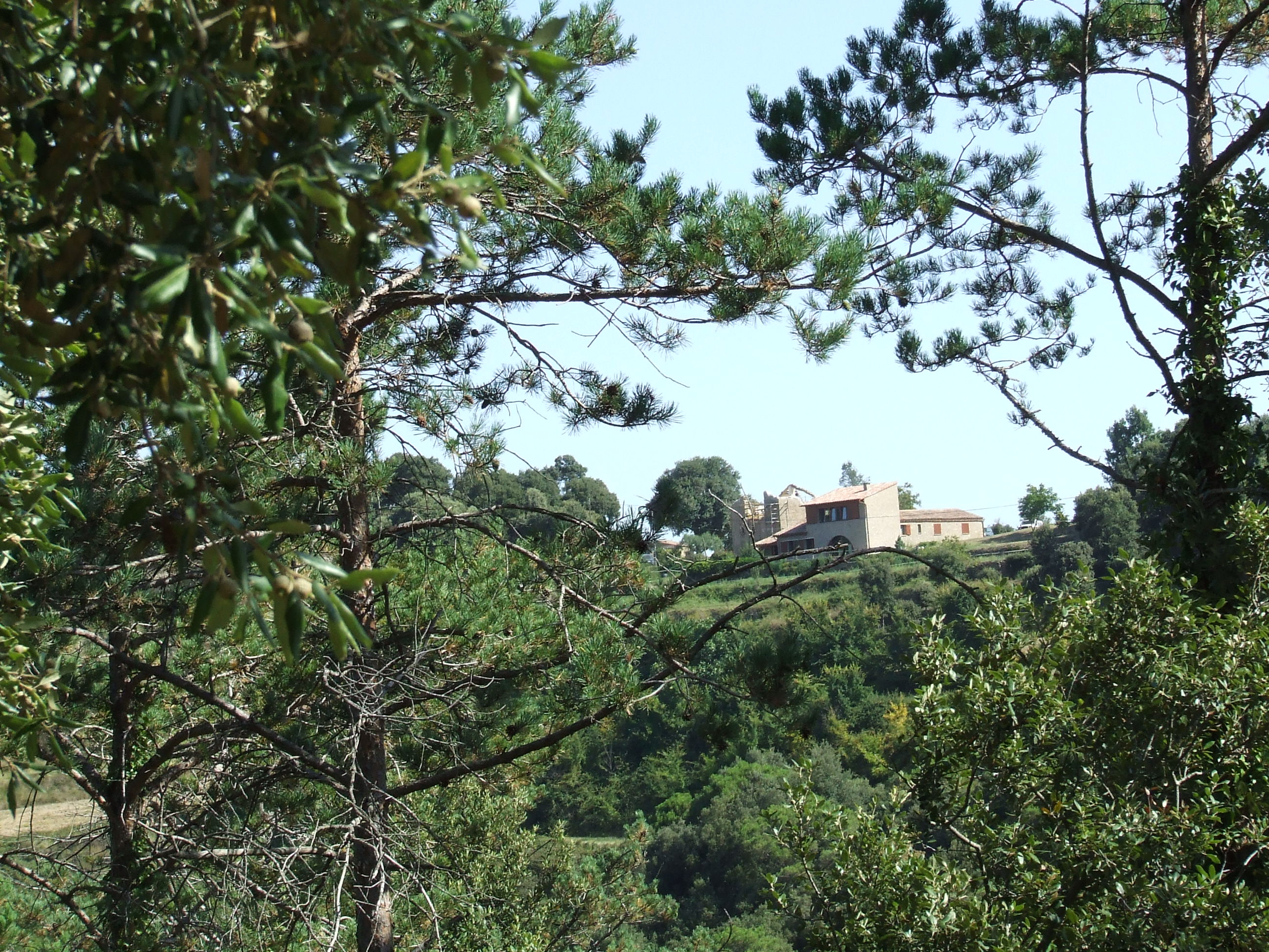 El Puig (Castellcir, Moianès)